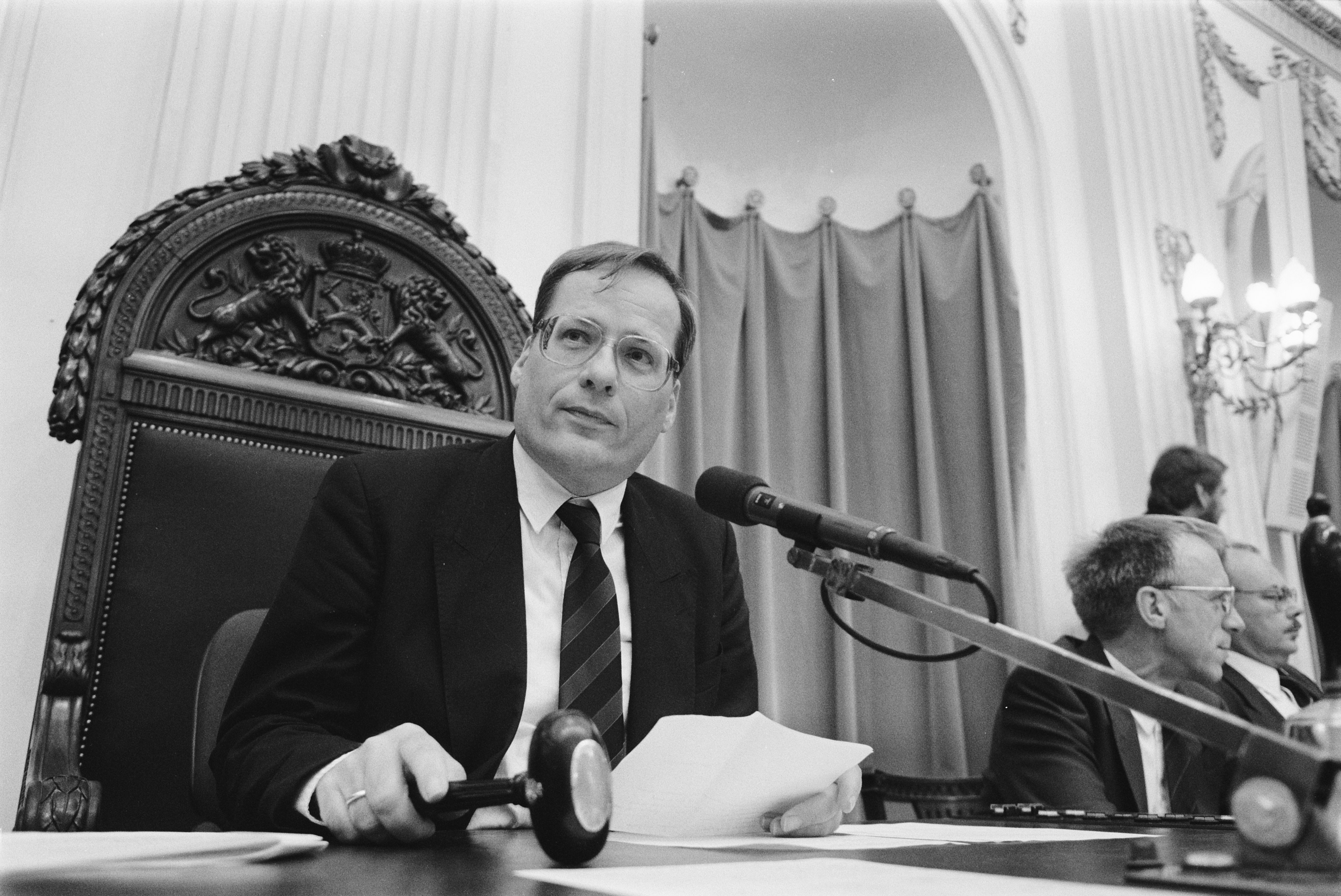 Collectie / Archief : Fotocollectie Anefo Reportage / Serie : Installatie kamerleden na de verkiezingen Beschrijving : Wim Deetman nu kamervoorzitter Datum : 14 september 1989 Locatie : Den Haag, Zuid-Holland Trefwoorden : installaties, kamerleden, politiek, voorzitters Persoonsnaam : Deetman, Wim Fotograaf : Croes, Rob C. / Anefo Auteursrechthebbende : Nationaal Archief Materiaalsoort : Negatief (zwart/wit) Nummer archiefinventaris : bekijk toegang 2.24.01.05 Bestanddeelnummer : 934-5003